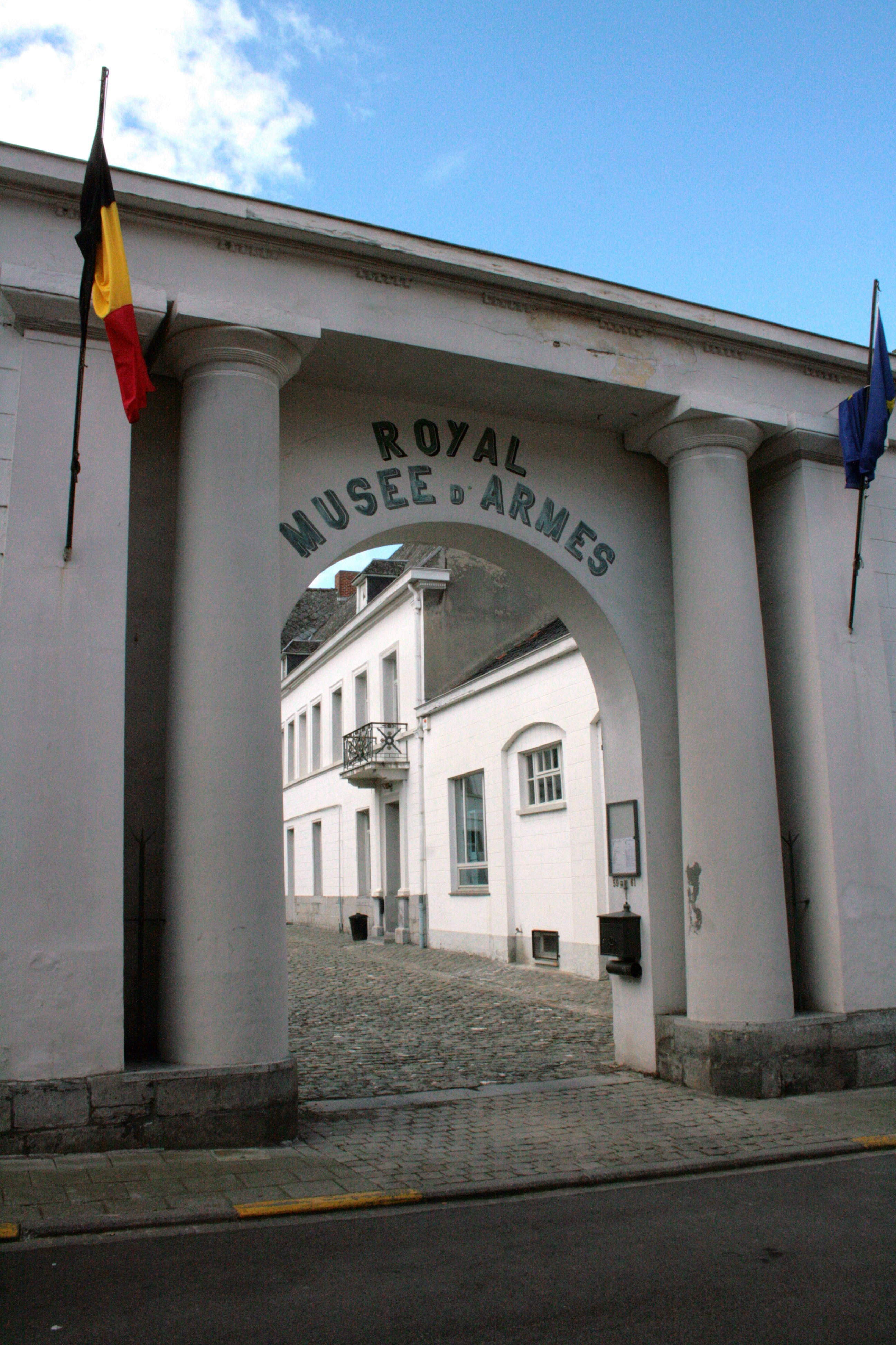 Musée d'Armes et d'Histoire militaire, rue Roc Saint-Nicaise 59-61, Tournai (Belgique).